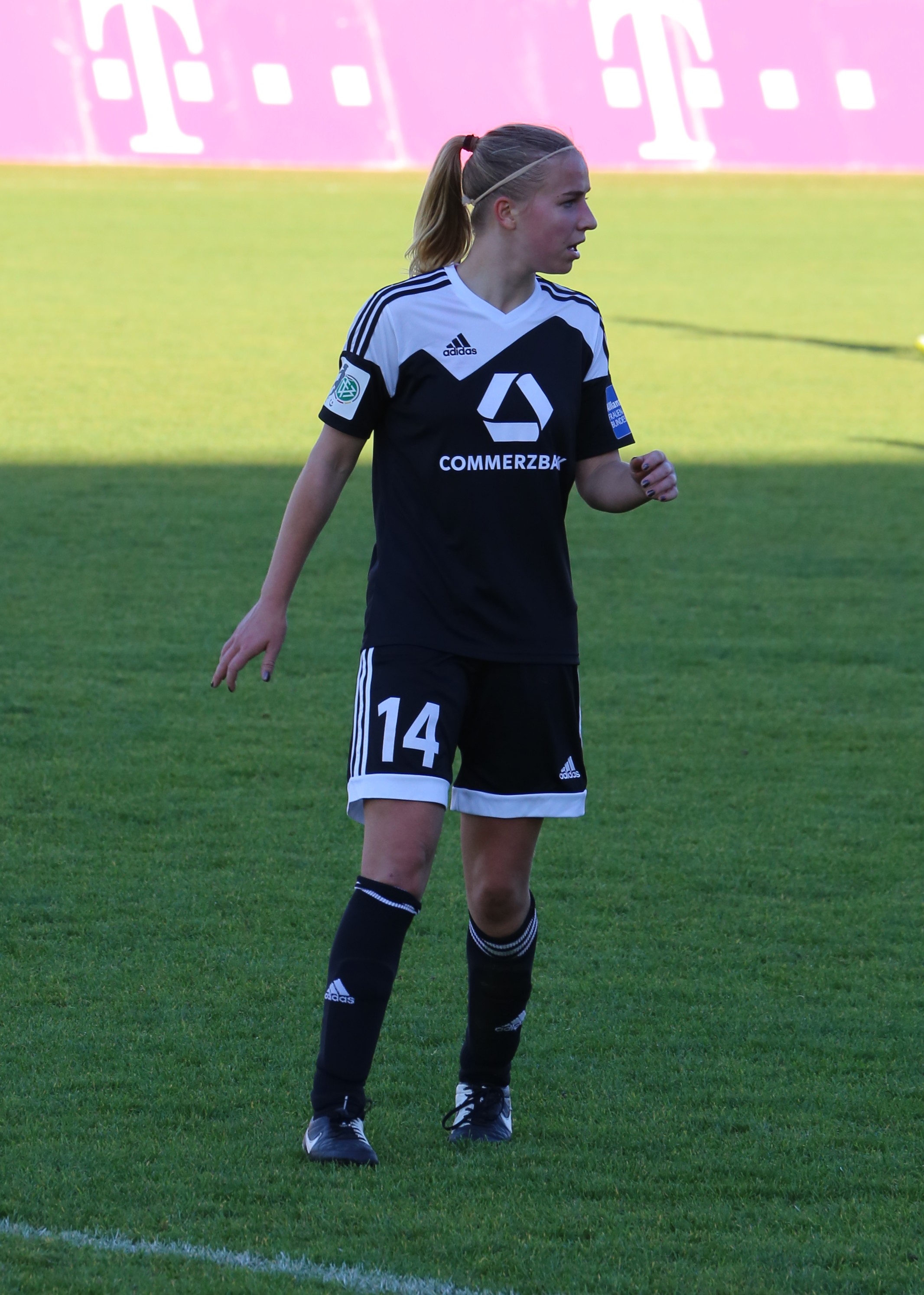 Jackie Groenen (1. FFC Frankfurt) im DFB-Pokal-Achtelfinale zwischen FC Bayern München und 1. FFC Frankfurt, Ergebnis 2:0, Stadion an der Grünwalder Straße